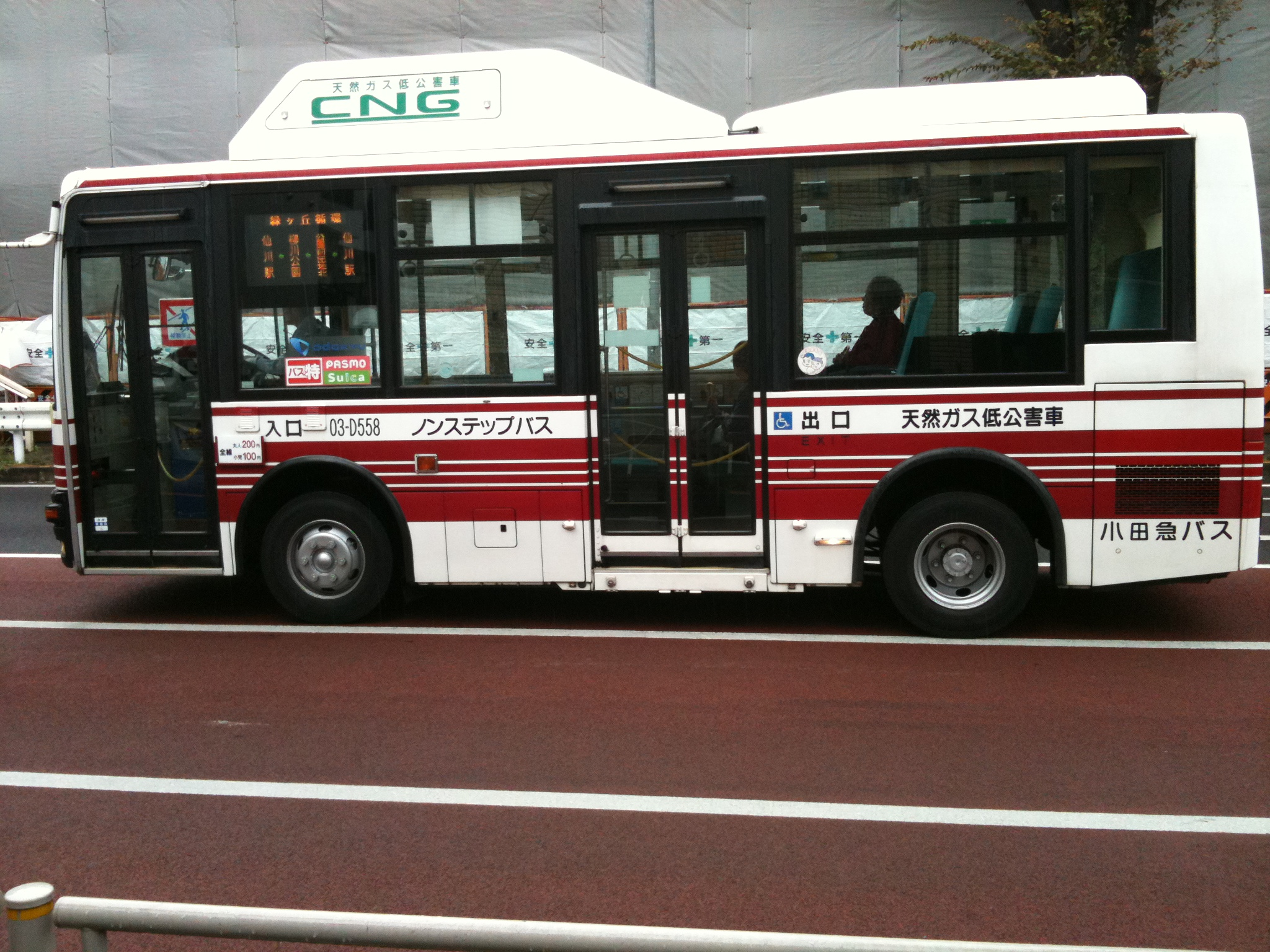 低公害車